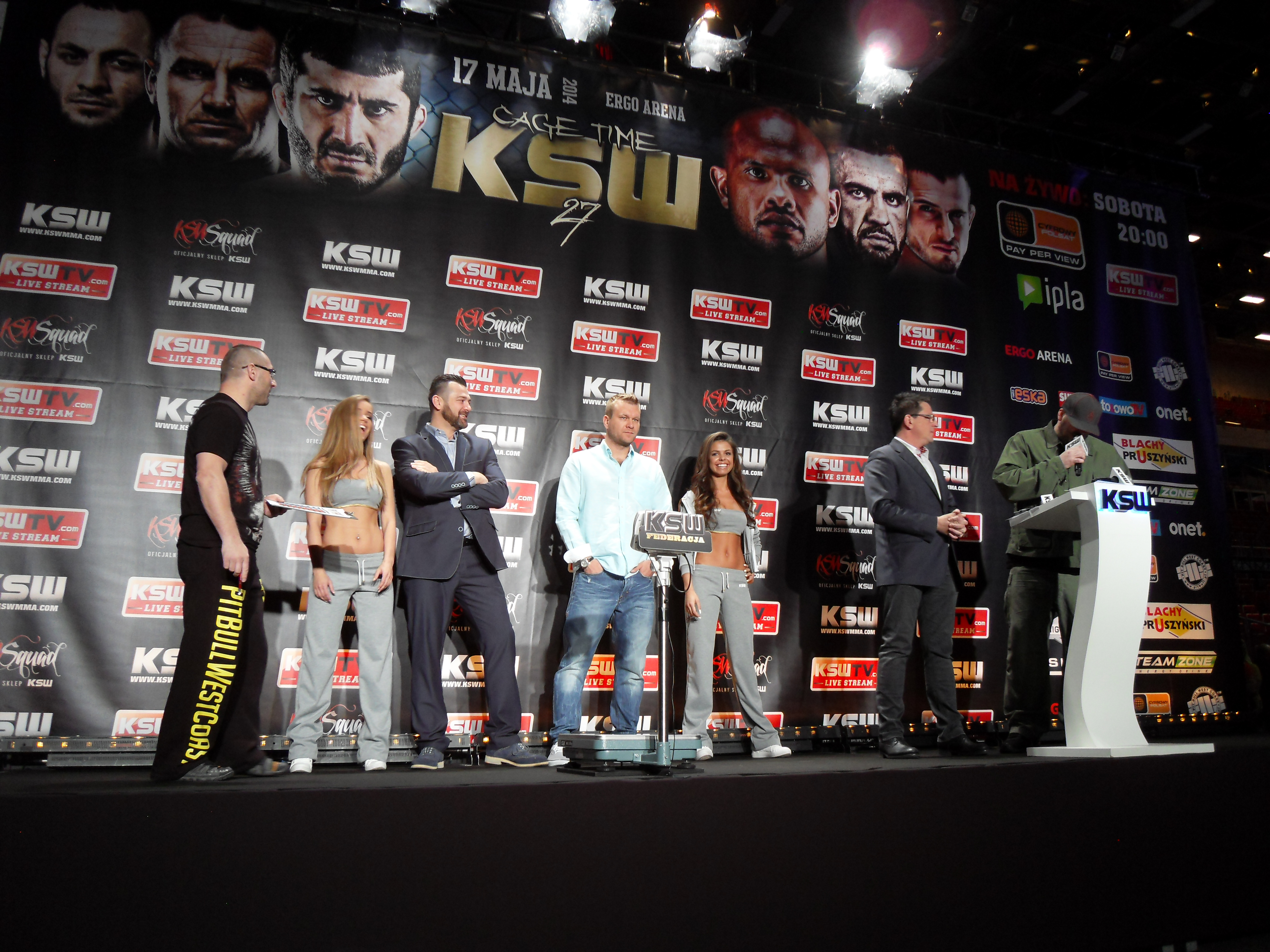 Gdańsk, ważenie w przeddzień KSW XXVII, "Ergo Arena", w środku Martin Lewandowski i Maciej Kawulski.